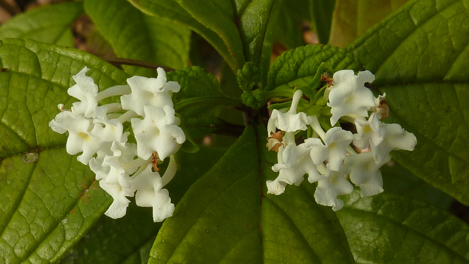 Lantana lucida Schauer